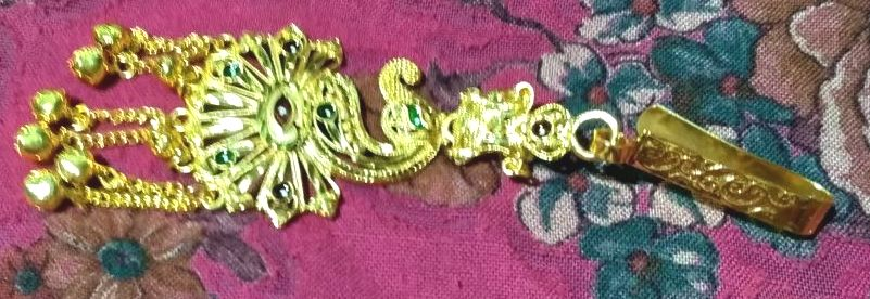 छल्ला